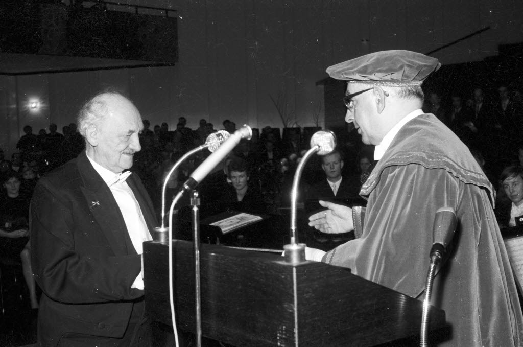 im Konzertsaal im Schloss. Im Bild Rektor Prof. Dr. Wolfgang Bargmann (rechts) übergibt die Verleihungsurkunde an den Historiker und Studienrat i.R. Thomas Otto Achelis (links). Die Ehrungen bilden zugleich den Abschluss der Feiern zum 300jährigen Jubiläum der CAU.